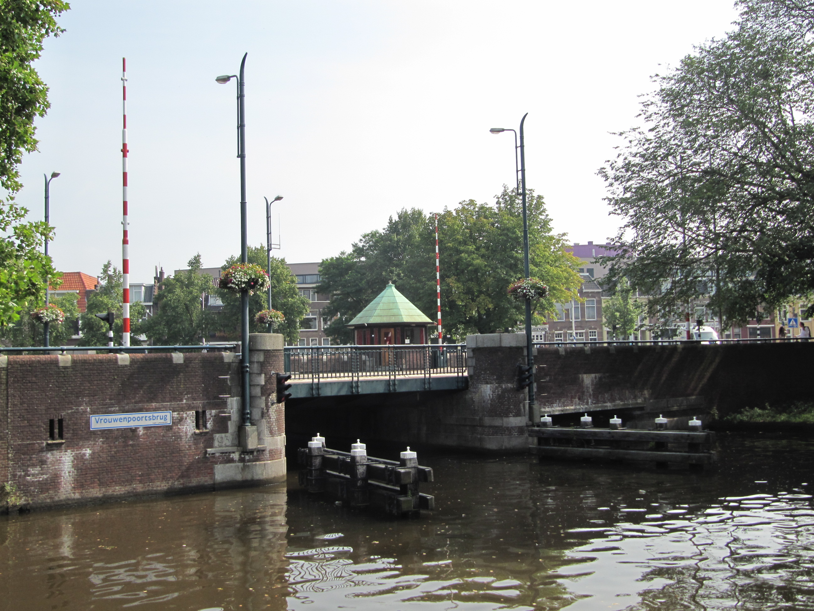 RM516451 Leeuwarden - Vrouwenpoortsbrug.jpg